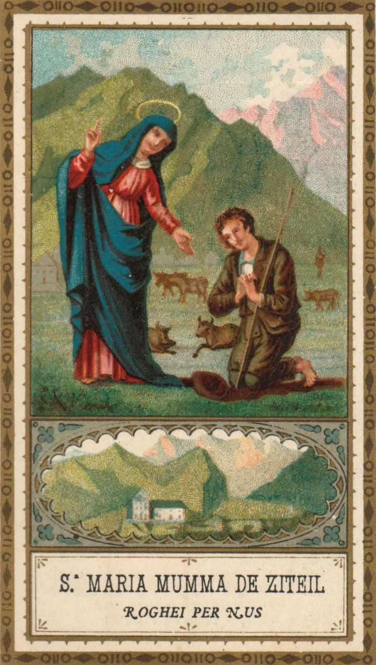 Die Erscheinung der Mutter Gottes vor dem Hirten Giatgen Dietegen de Marmels, 1580, auf Ziteil (2431m, Salouf, Graubünden, Schweiz). Rumantsch: L'apparaziun da Nossadon avant igl paster Giatgen Dietegen de Marmels, 1580, a Ziteil (2431m, Salouf, Grischun, Svizra)